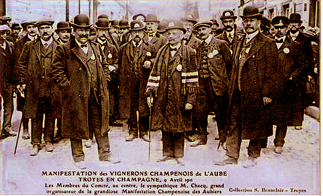 Manifestation des vignerons de l'Aube à Troyes (Aube, France).